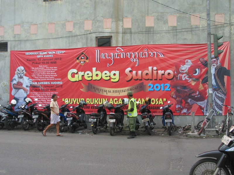 Festival Gerebeg Sudiro 2012